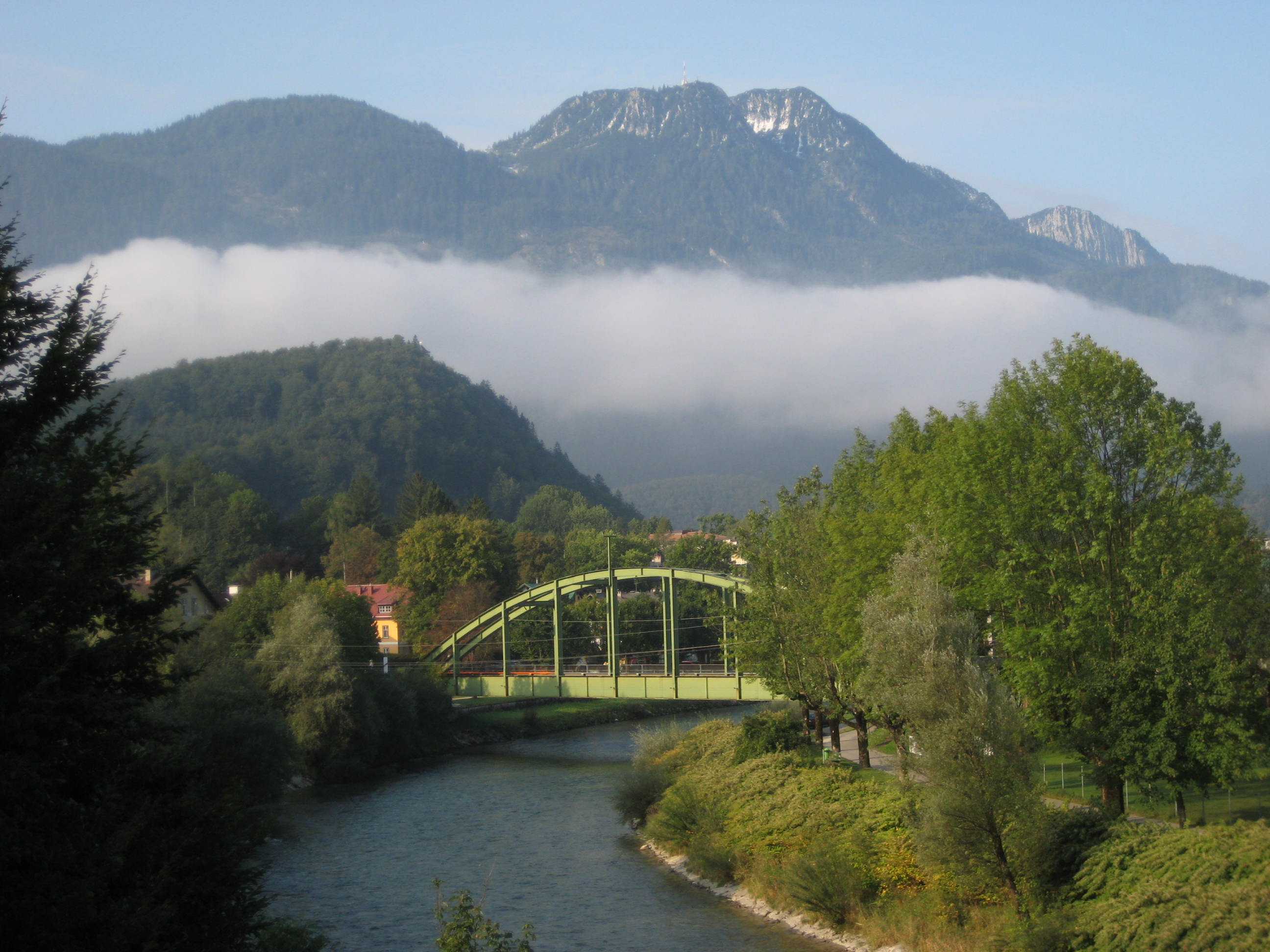 Berge in Bad Ischl: unter Wolken der Siriuskogl, im Hintergrund die Katrin, im Vordergrund die Traun mit Eisenbahn- und Fußgängerbrücke, aufgenommen in der Maxquellgasse